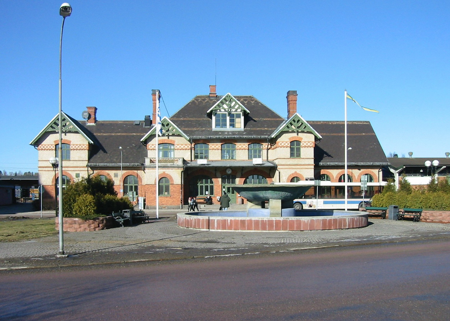 Fagersta C från Centralvägen. Västanfors